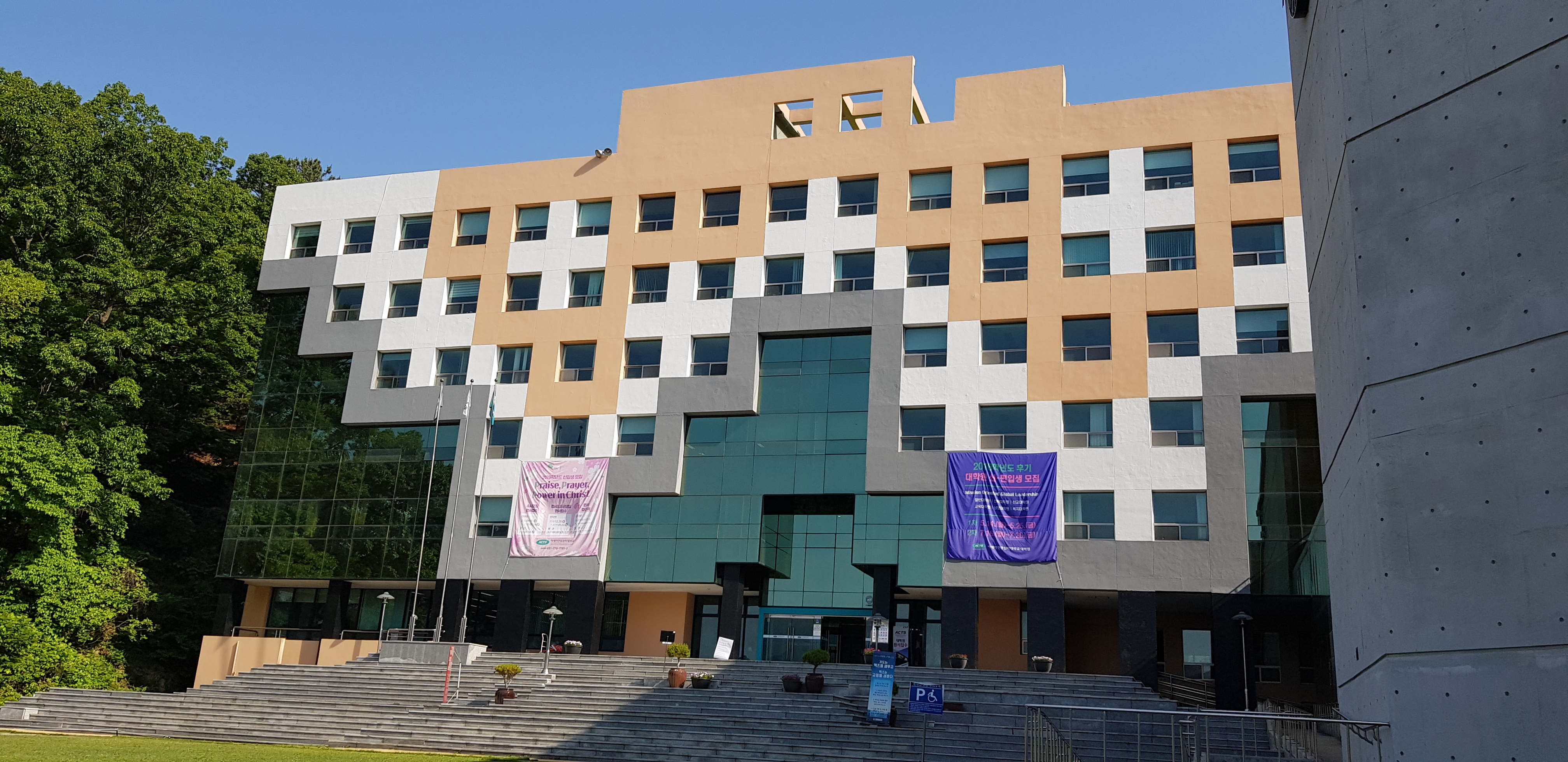 아세아연합신학대학원대학교 본관